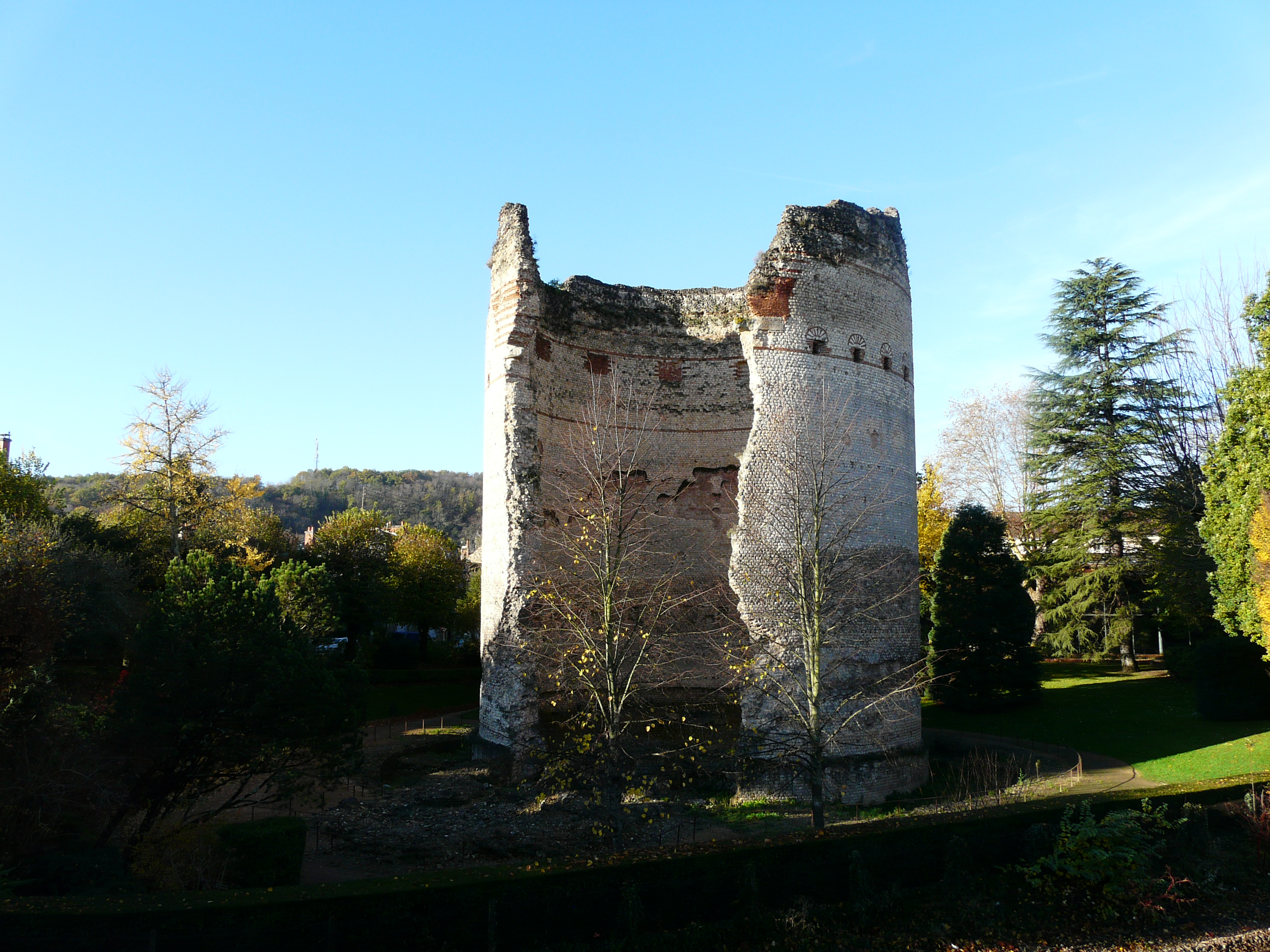 La tour de Vésone, Périgueux, Dordogne, France.